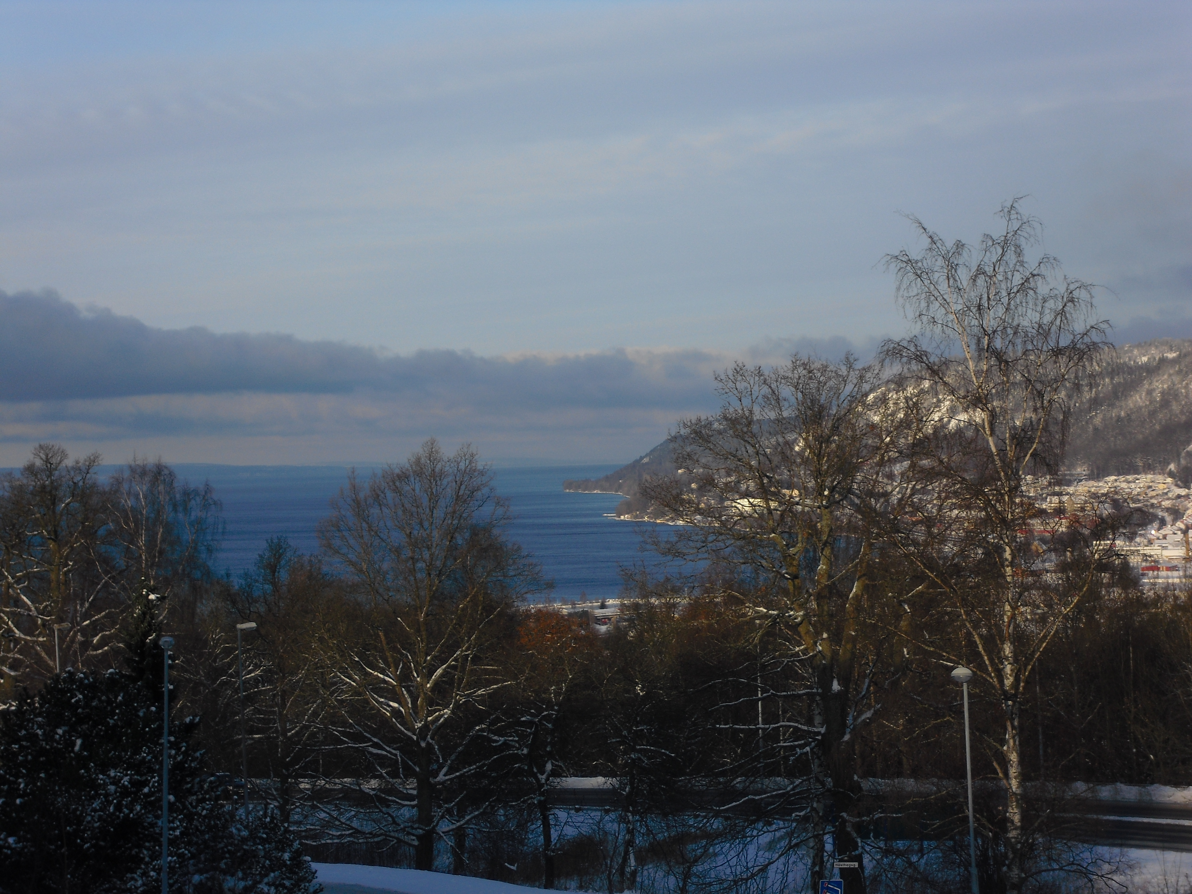 Öxnehaga, Jönköping, Sweden